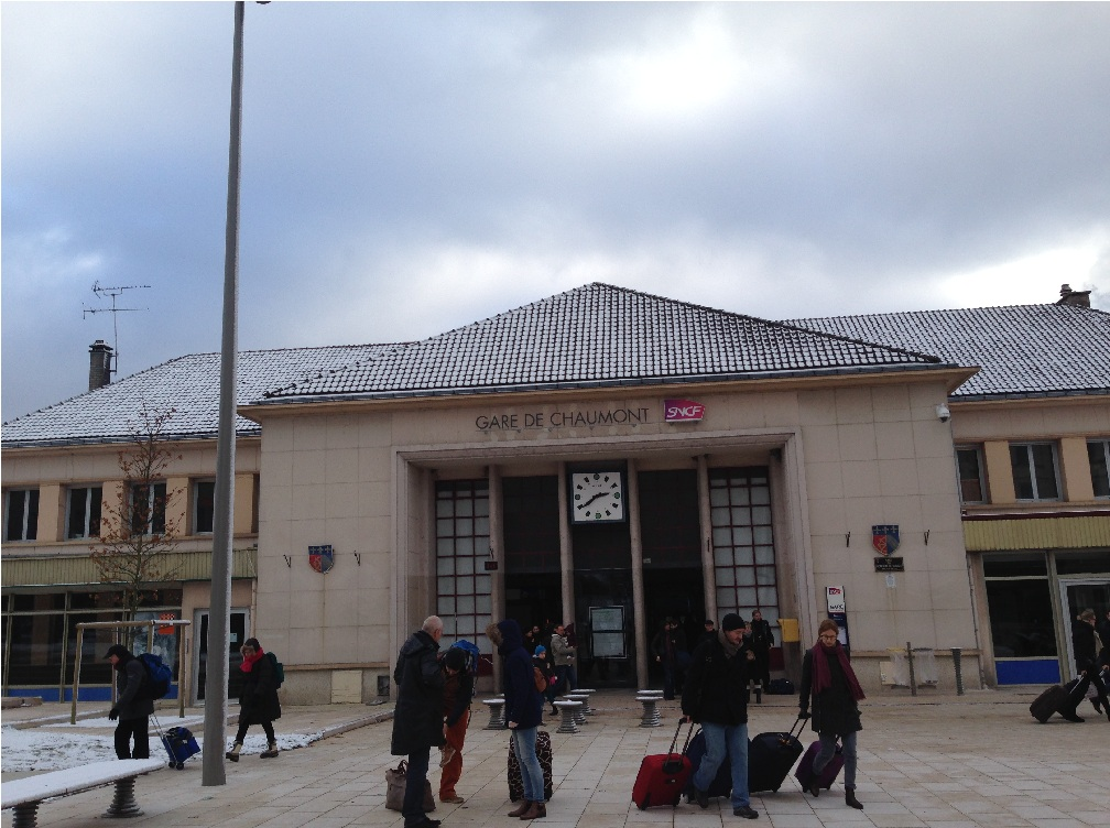 Gare de Chaumont-2014